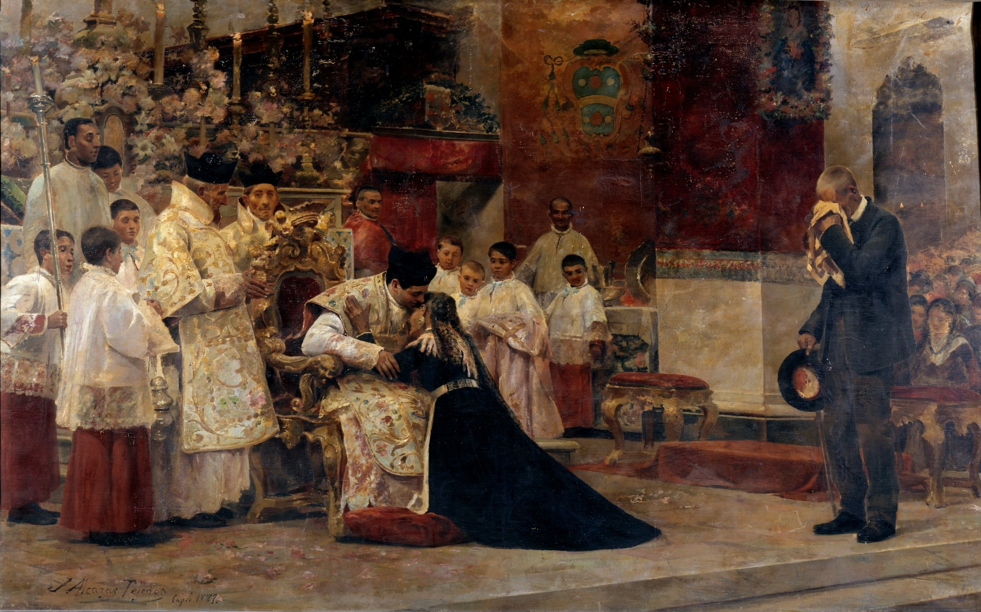 Los padres del celebrante después de la misa nueva, 1887